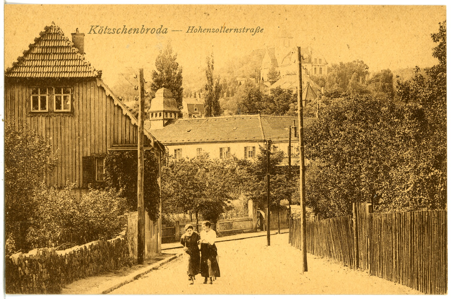 Radebeul; Hohenzollernstraße in Kötzschenbroda This postcard is from publisher Brück & Sohn in Meißen ( postcard has a unique number 22004 and is available in a higher resolution at the publisher. This images was uploaded in a cooperation project between Wikipedians and the publisher.